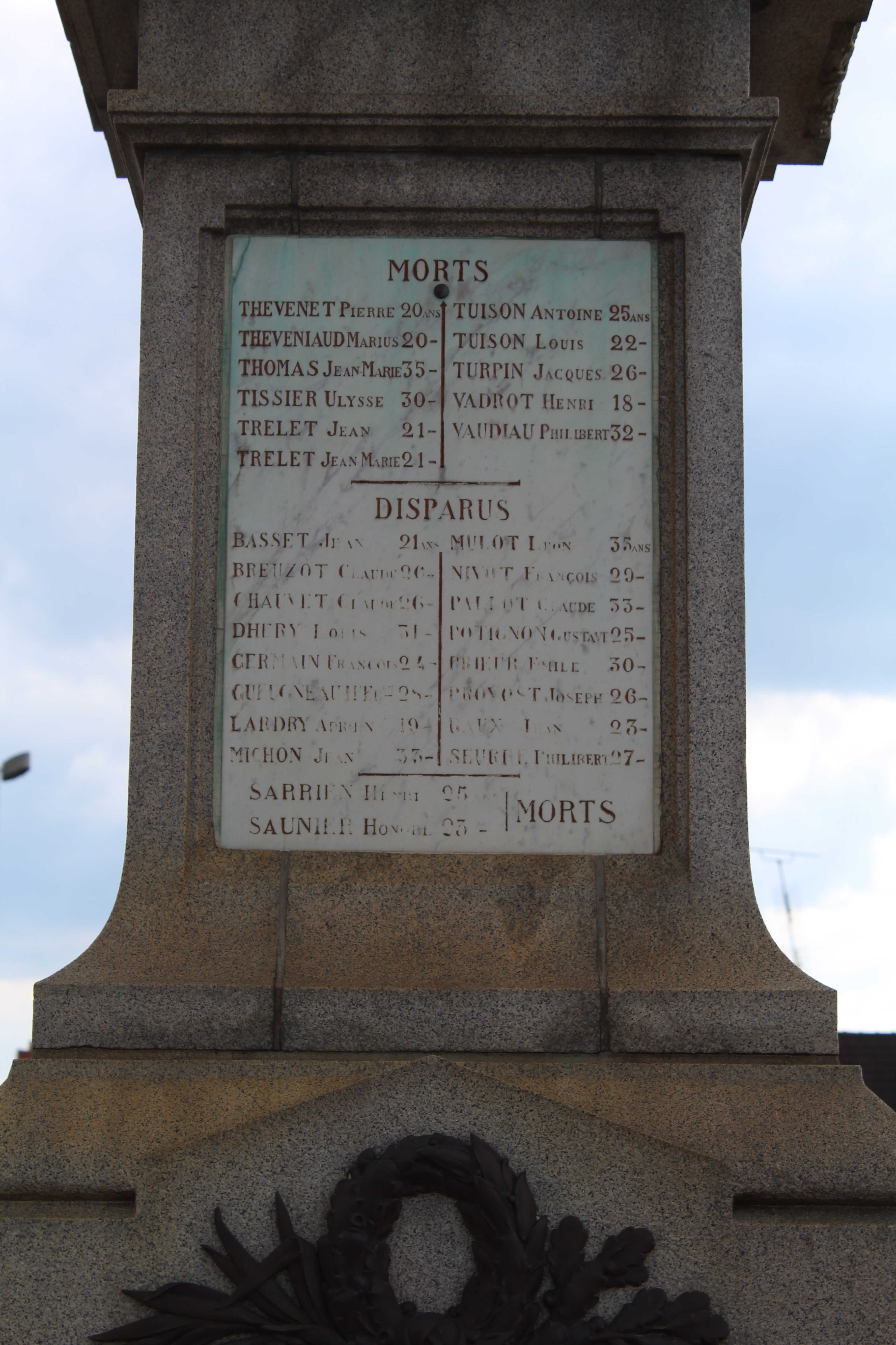 Monument aux morts des ouvriers et employés des Forges de Gueugnon.